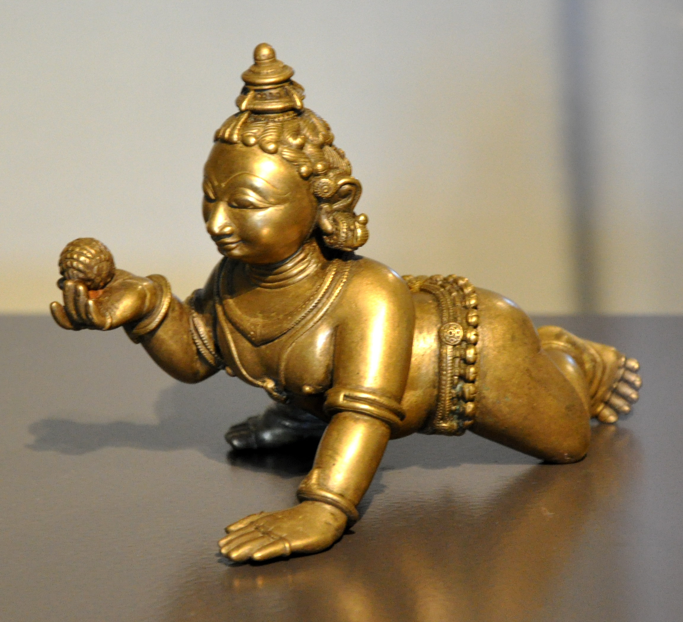 ଓଡ଼ିଆ: ଜୁରିକରେ ଥିବା ଓଡ଼ିଶାରୁ ସଂଗୃହୀତ ବାଳ କୃଷ୍ଣ